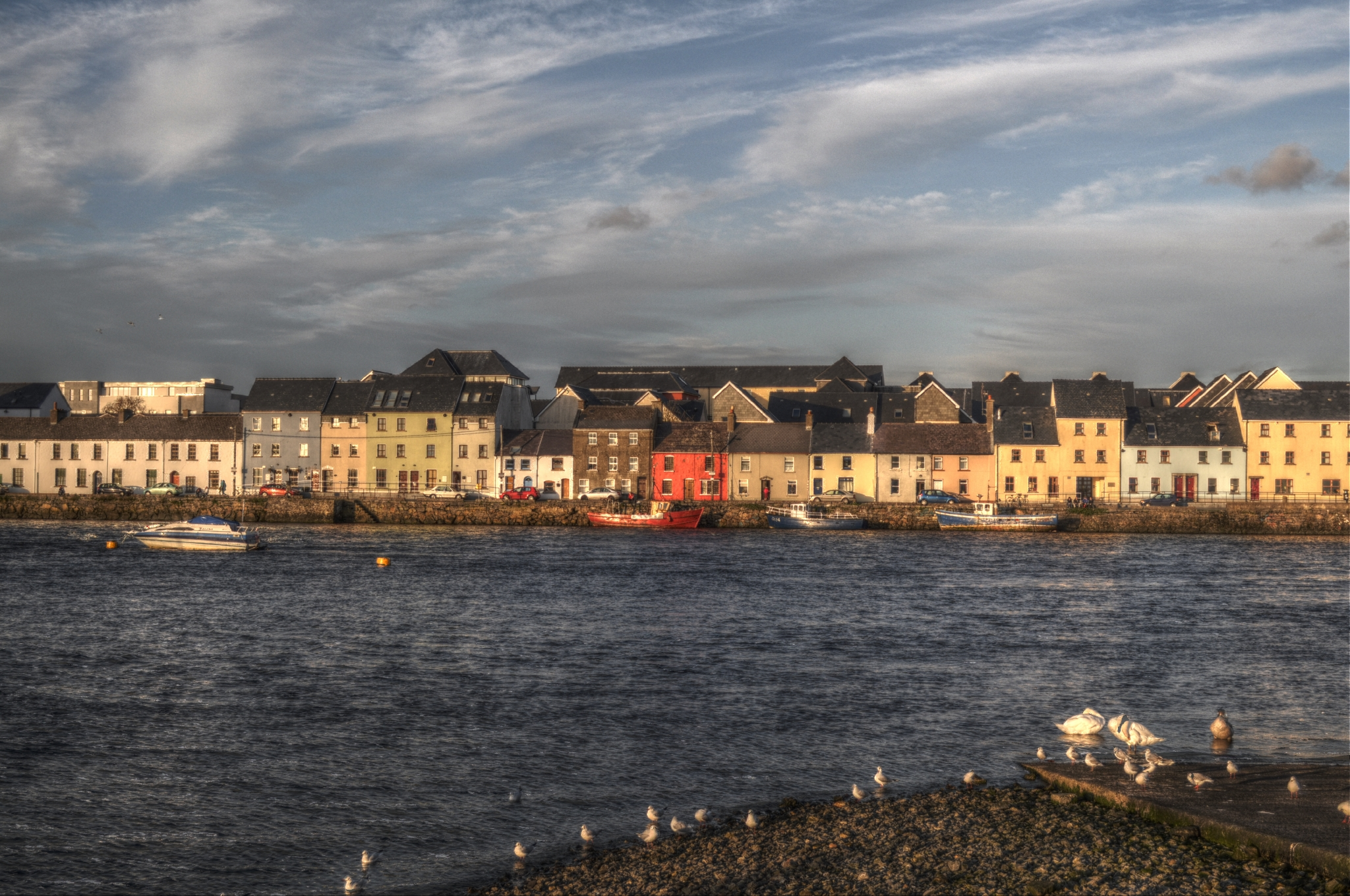 Camera: Nikon D5000 3 exposures: -2, 0, 2 EV Luminance HDR: Mantiuk'06